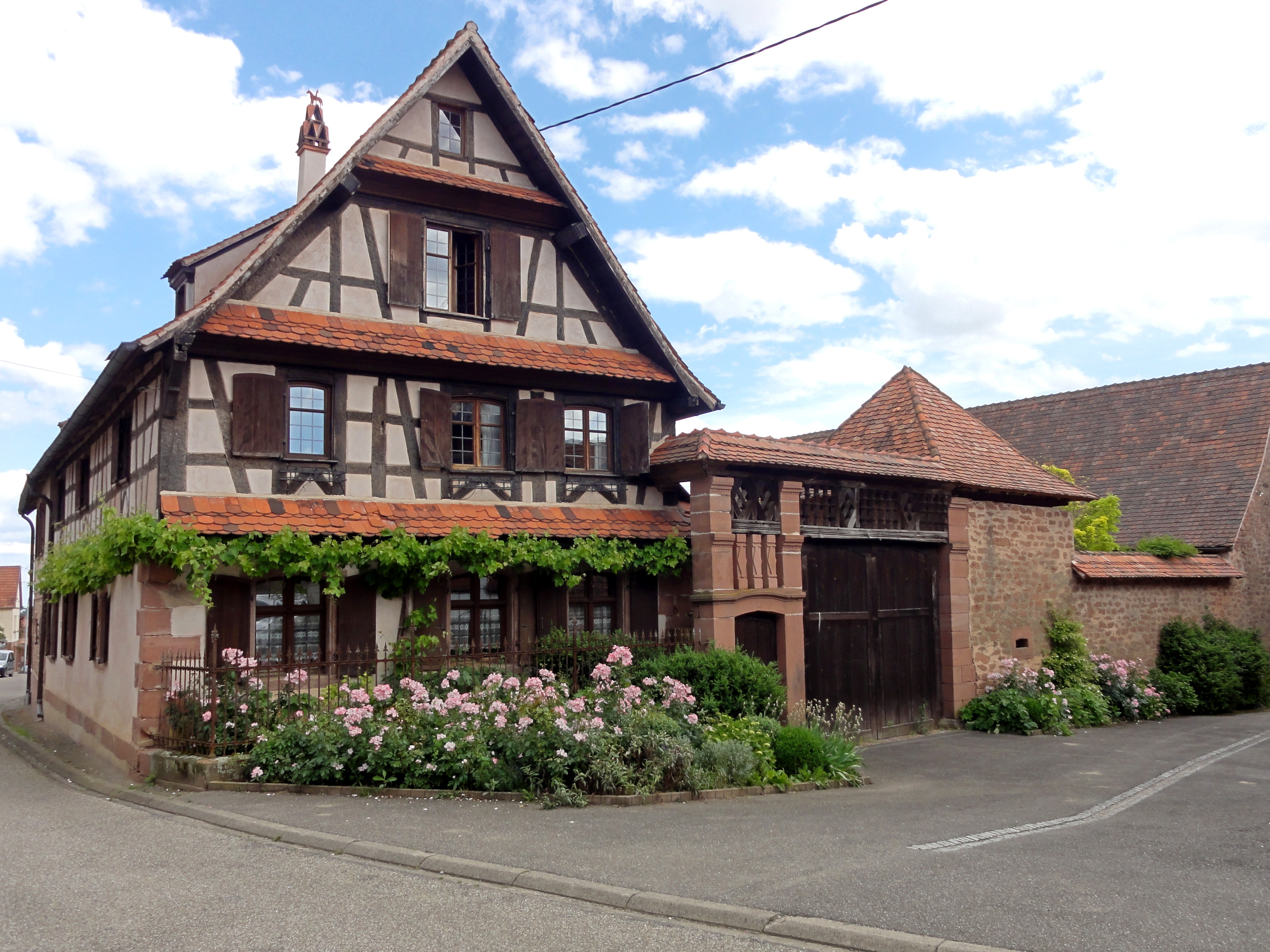 Alsace, Bas-Rhin, Schalkendorf, Ferme (XIXe), 22 rue Principale/Impasse des Cerisiers